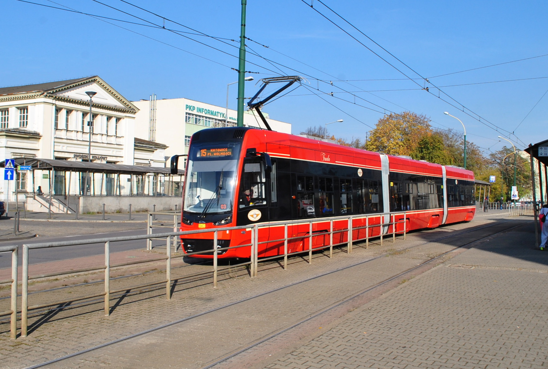 Sosnowiec. Pesa Twist 2012N w Sosnowcu